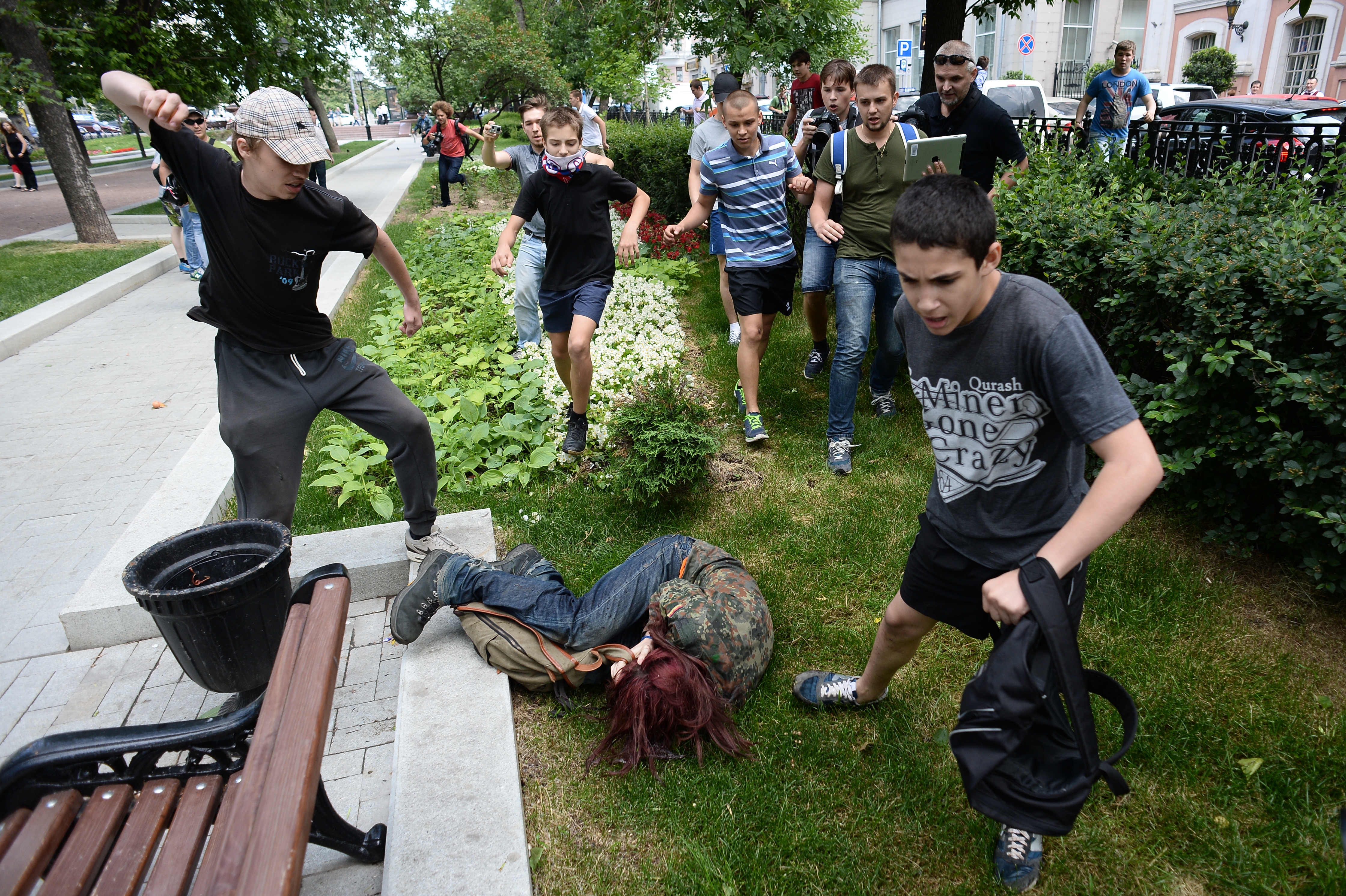 Акция активистов ЛГБТ сообщества "День Поцелуев" против принятия гомофобного закона у ГосДумы в Москве закончилась избиениями активистов и задержаниями.